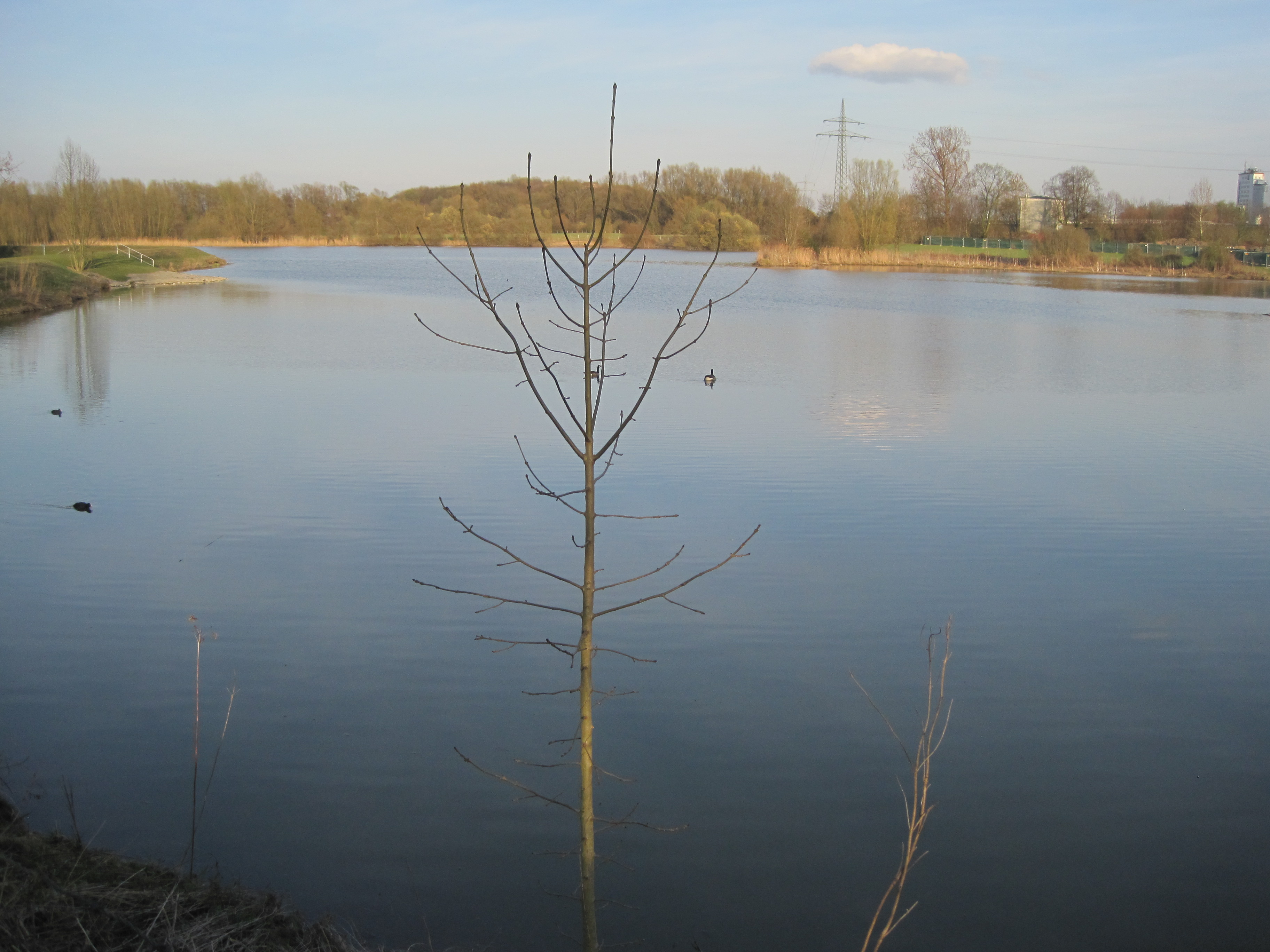 Das Foto zeigt den Radbodsee in Hamm-Bockum-Hövel.